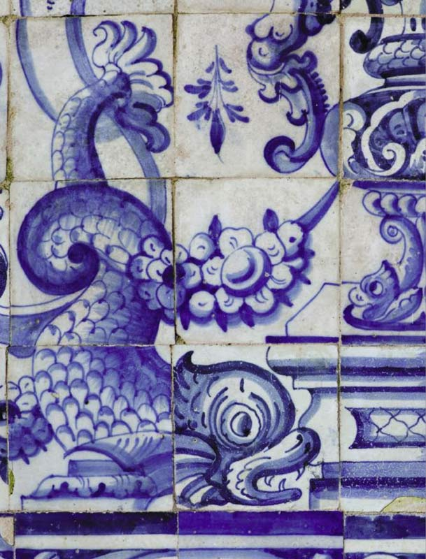 Detalhe de painel de azulejos pintados no Convento de Santo Antônio de Cairu